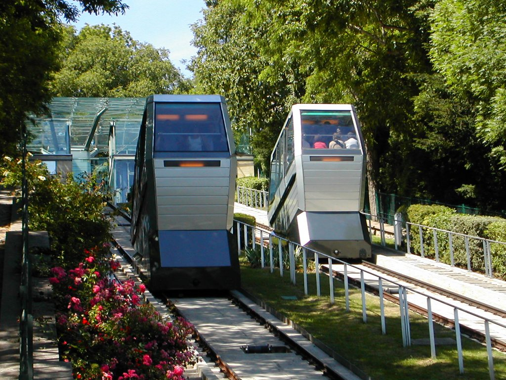 Funiculaire de Montmartre (Paris, France). Taget 21 juin 2003. Domaine Public. by Utilisateur:Béa